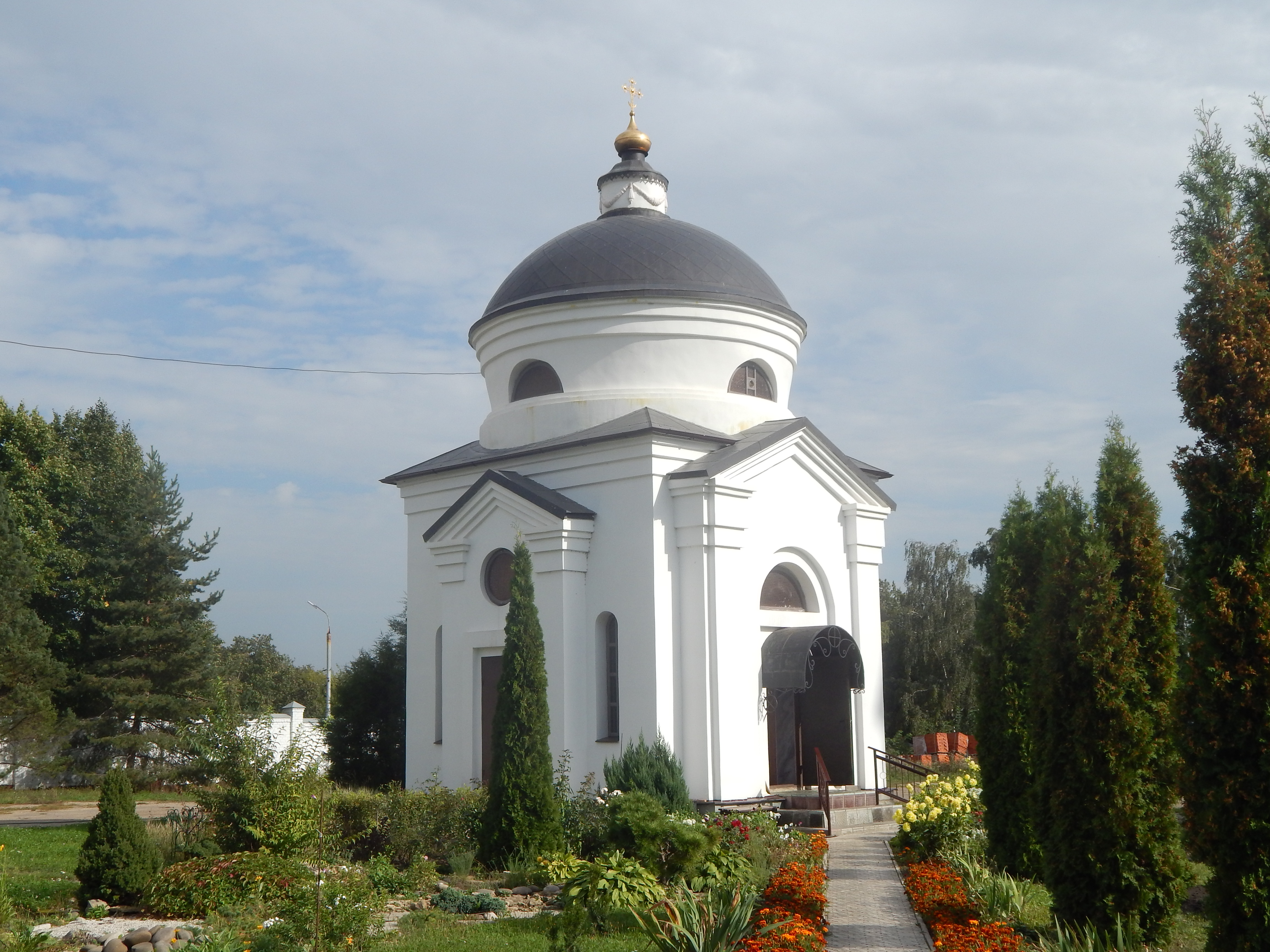 Успенский мужской монастырь. Часовня Александра Невского. Сооружена в 2004-2006 как водосвятная над артезианской скважиной: улица Ермолова, 11, Орёл, Орловская область